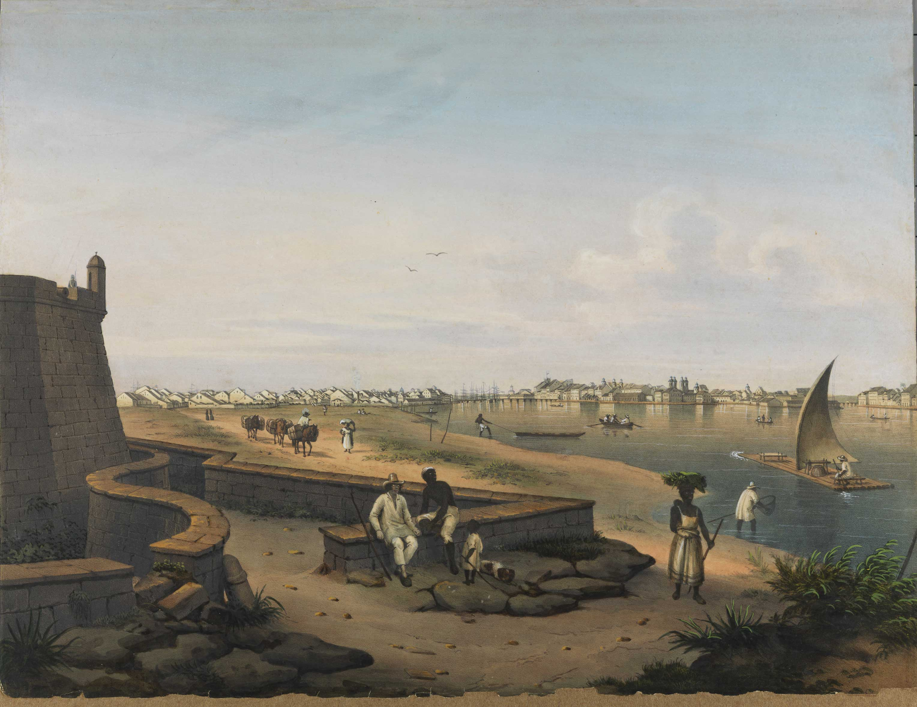 Vista da cidade de Recife tomada do Forte do Brum [Iconográfico] Imprenta [S.l.: s.n.], [18--]. Descrição original: 1 gravura : litograv., color. ; 41,4 x 50,4 em gravura colada em papel 42,3 x 54,4 cm.